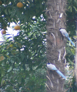 木に集まって鳴き交わすオナガ 撮影日：2006年01月01日 撮影地：久地円筒分水（神奈川県川崎市高津区久地） 撮影者：cory 出典： "Onaga" (Cyanopica cyanus japonica) Date: 2006-01-01 (Jan 01, 2006) Place: Nikaryo-yosui, Takatsu Kawasaki Kanagawa, Japan. Author: ISAKA Yoji (cory)